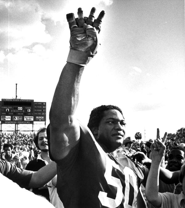 Ron Simmons saluant le public d'un stade de football américain.